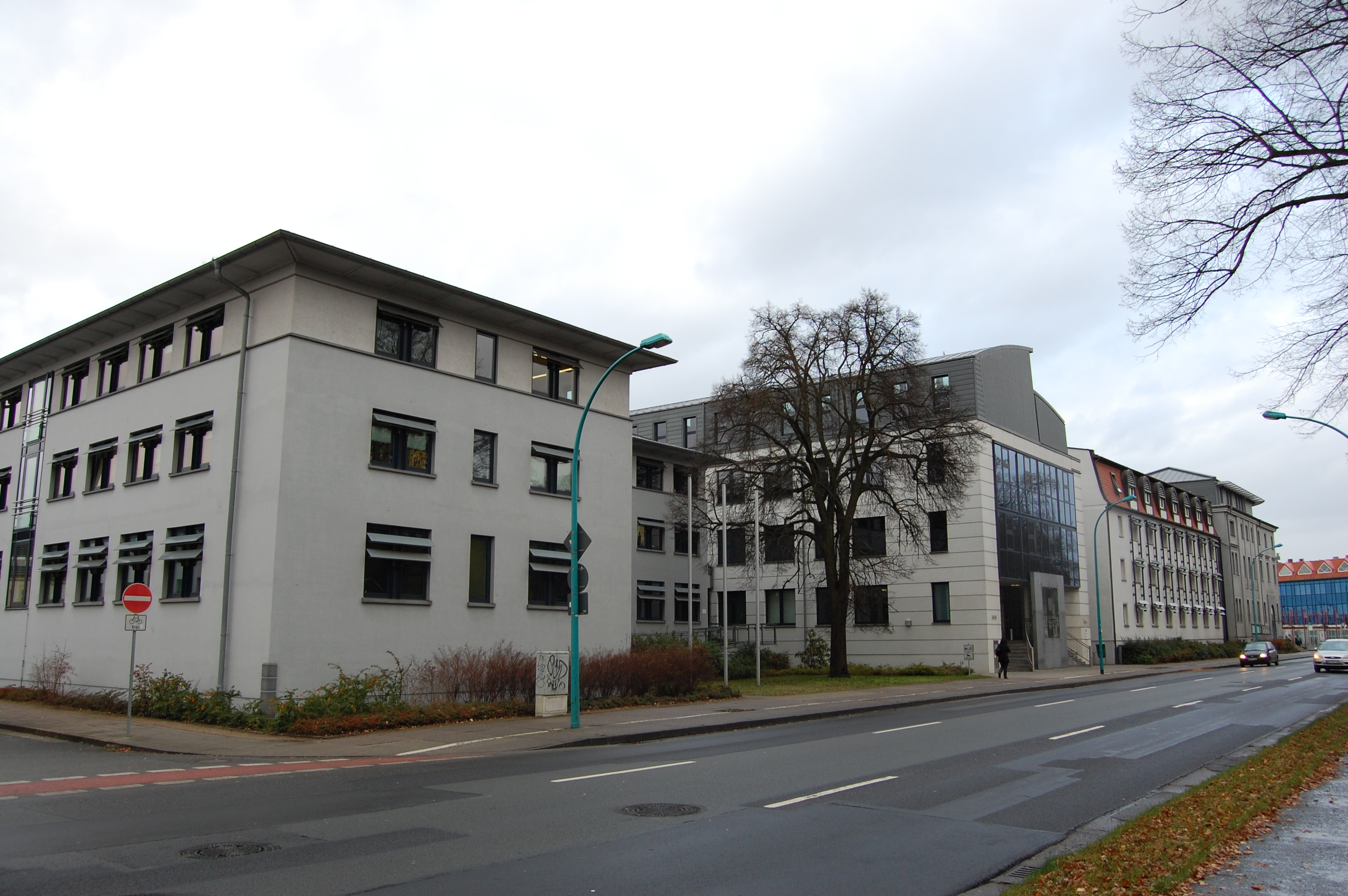 Justizzentrum Neubrandenburg, enthält Gebäude des Amtsgerichts, Landgerichts und Sozialgerichts.